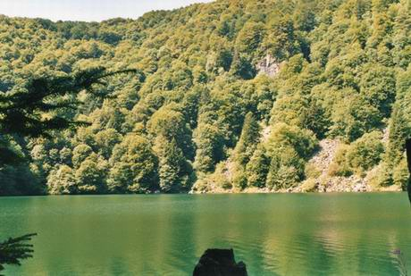 Lac des Perches, Haut-Rhin, France Source: photo perso Rémi Stosskopf